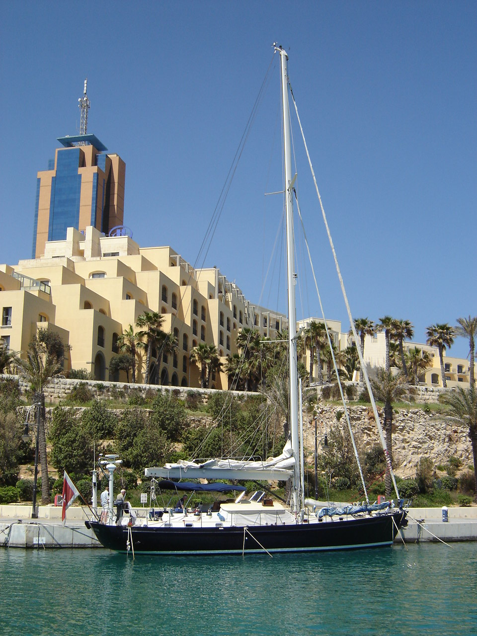 Boot. Malta, April 2006. Fahrtensegelyacht mit Lazy Jack (Faulenzer) am Mast